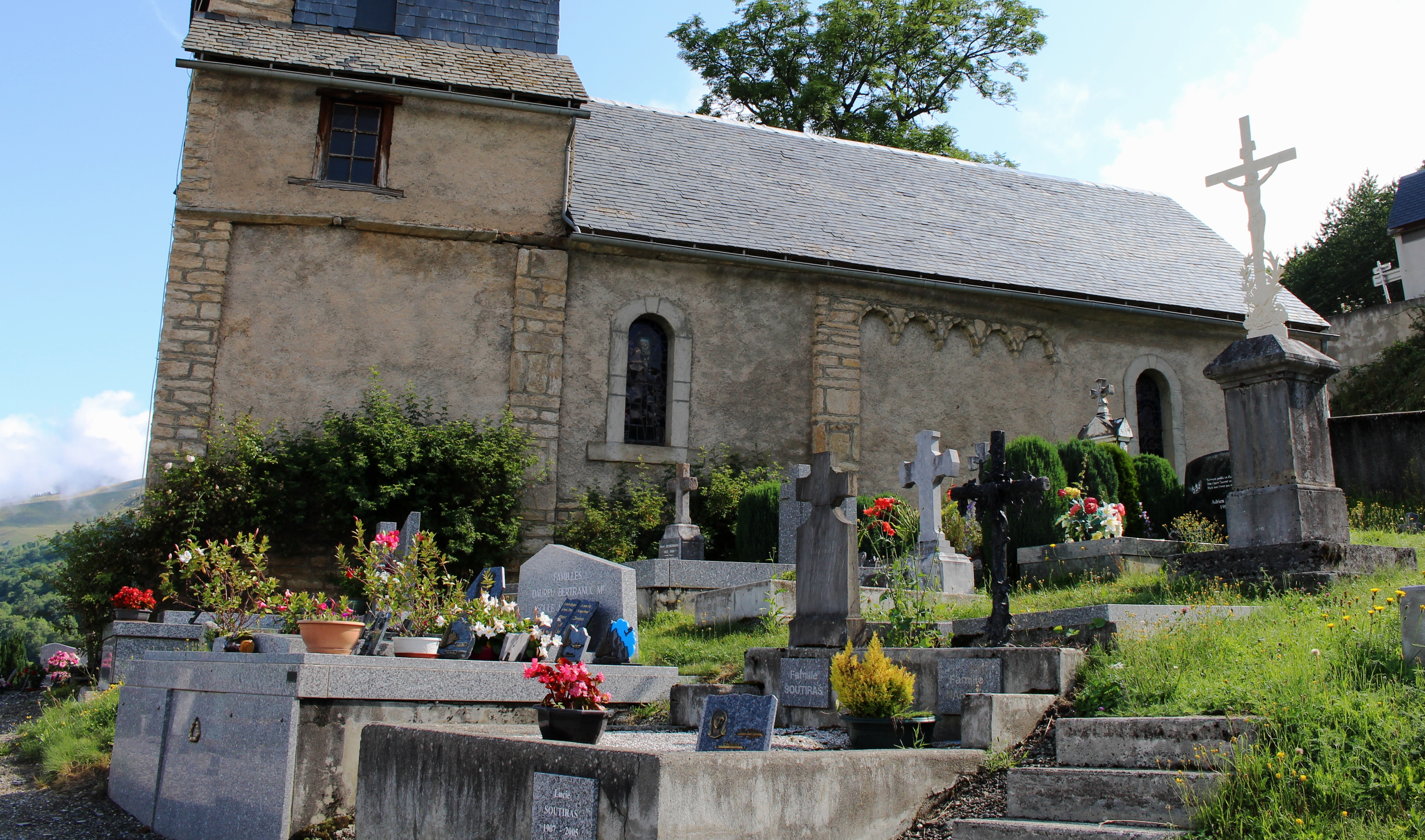 Cimetière de Loudervielle (Hautes-Pyrénées)